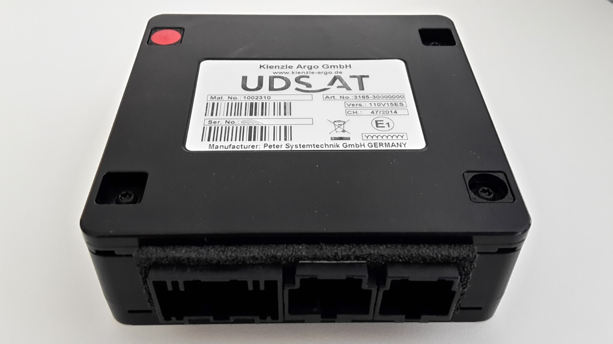 Unfalldatenspeicher UDS-AT der dritten Generation, entwickelt von den Firmen Peter Systemtechnik GmbH und Kast GmbH